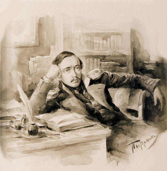 Michail Lermontov in un ritratto di Leonid Pasternak del 1891, a cinquant'anni dalla morte del poeta. L'opera è conservata al museo di Tarchany